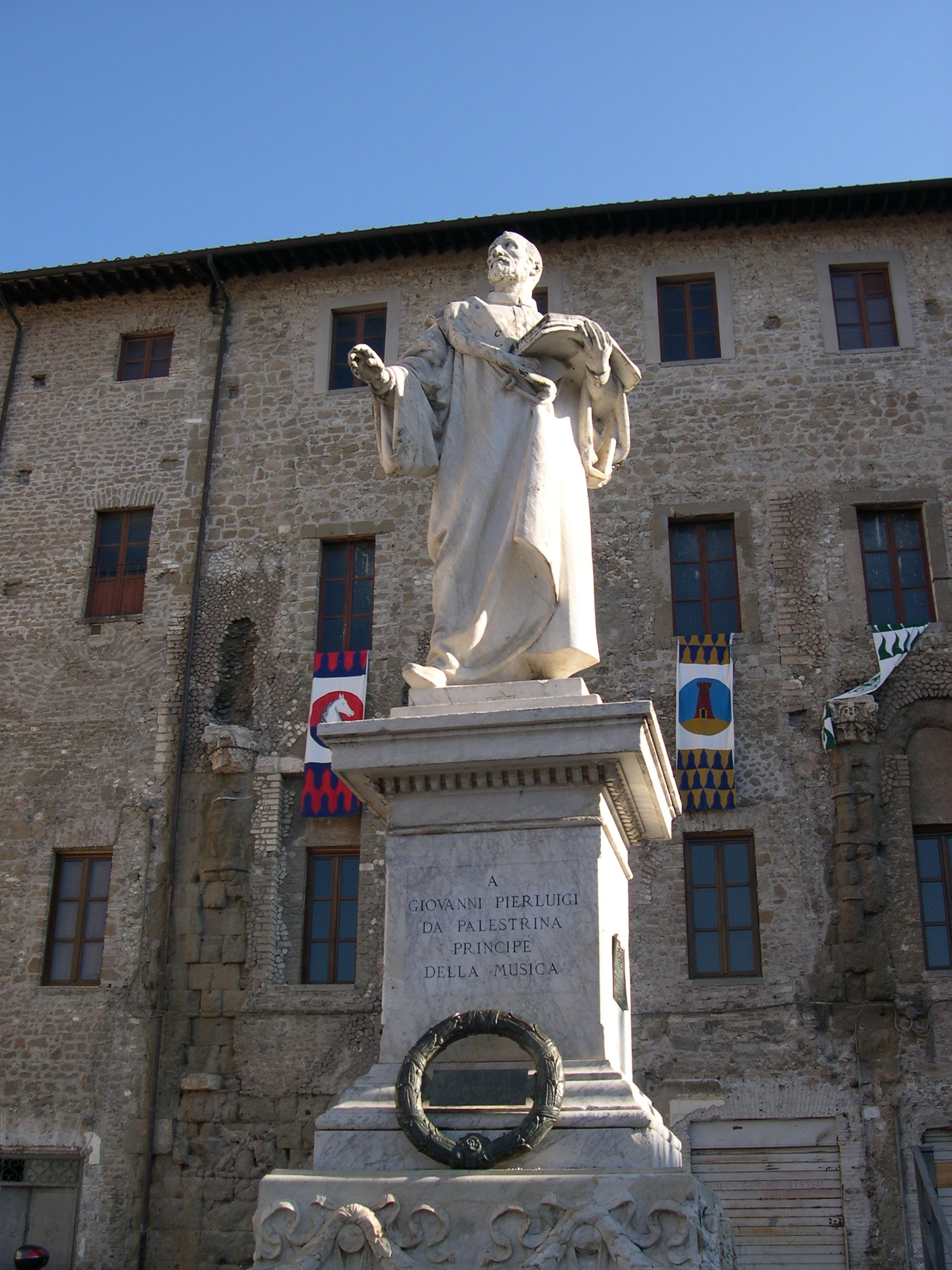 Giovanni da Plaestrina sculpture